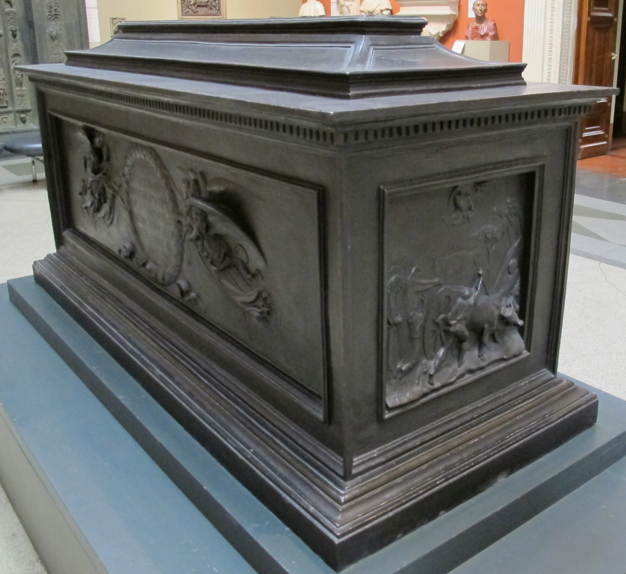 Museo pushkin, calchi, ghiberti, arca di san zanobi